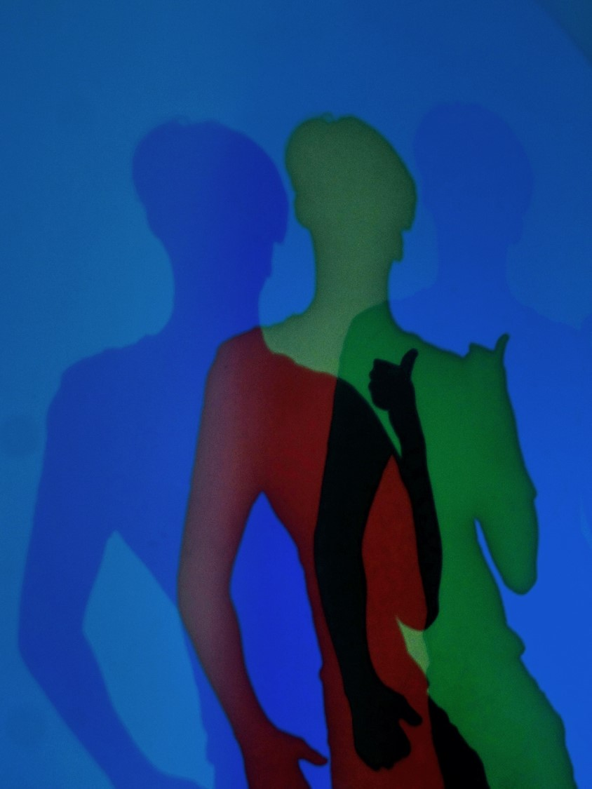 Luces y sombras de colores